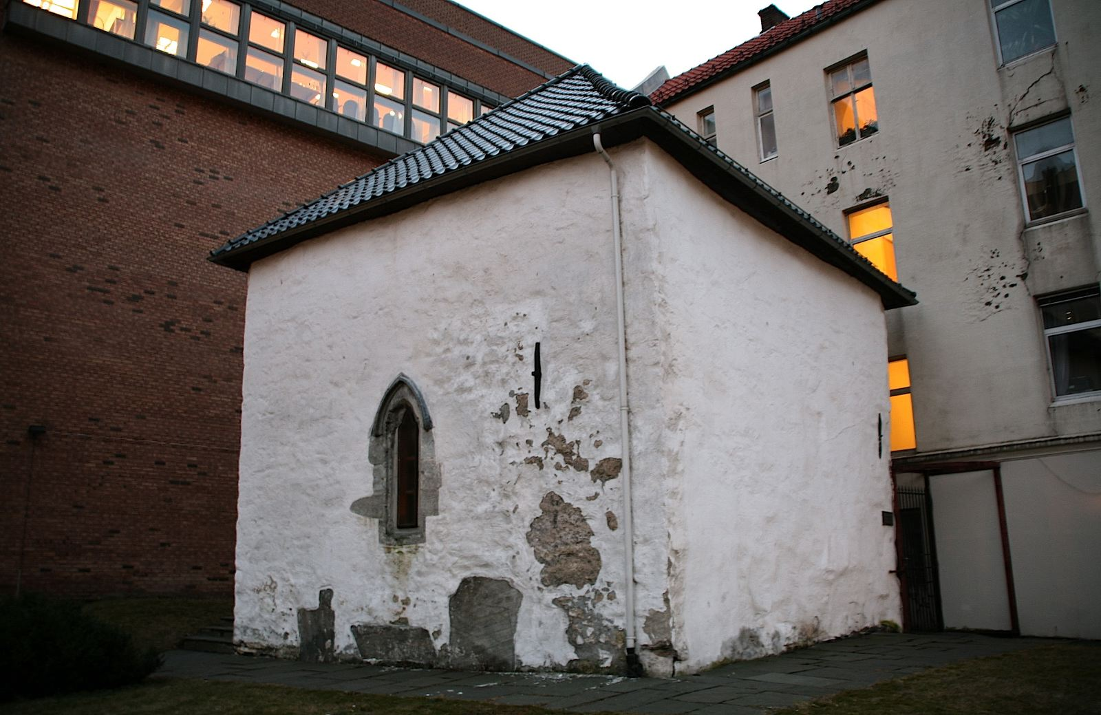 Nonneseter kapell